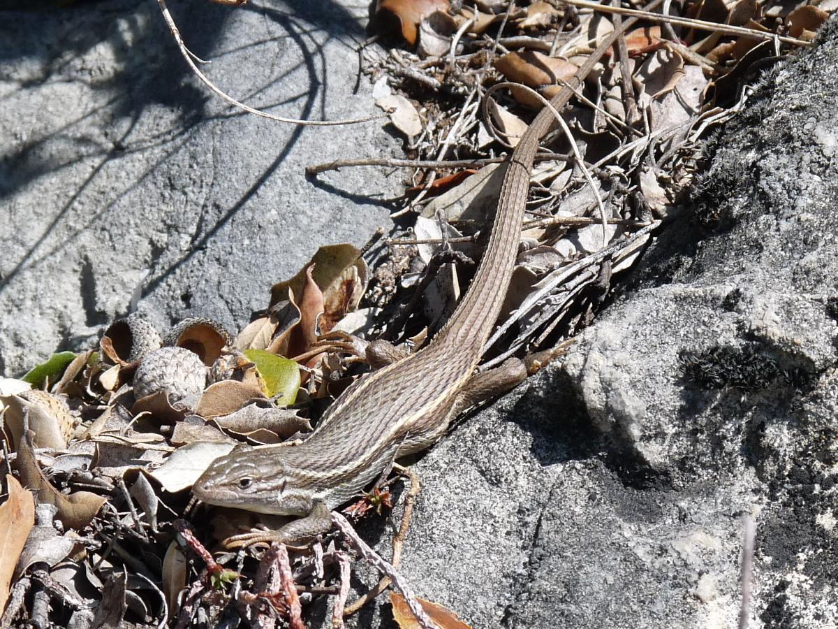 psammodromus algirus, Queralt, Berga, Espagne